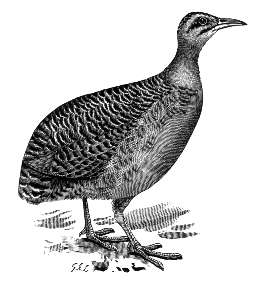 Great Tinamou , Tinamus major, engraving